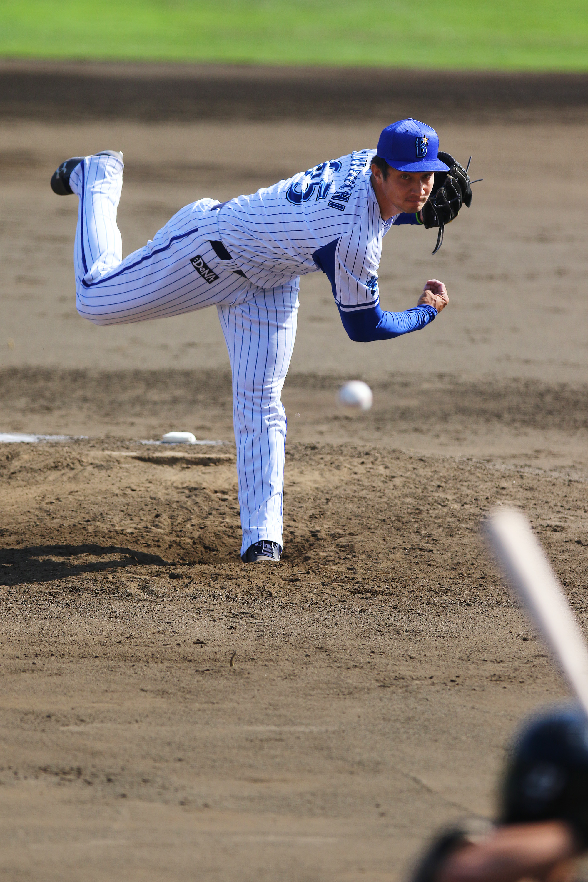 2018年4月29日 横浜DeNAベイスターズ vs 北海道日本ハムファイターズ（ファーム） バッティングパレス相石スタジアムひらつか（平塚球場） 横浜DeNAベイスターズ #65 国吉佑樹